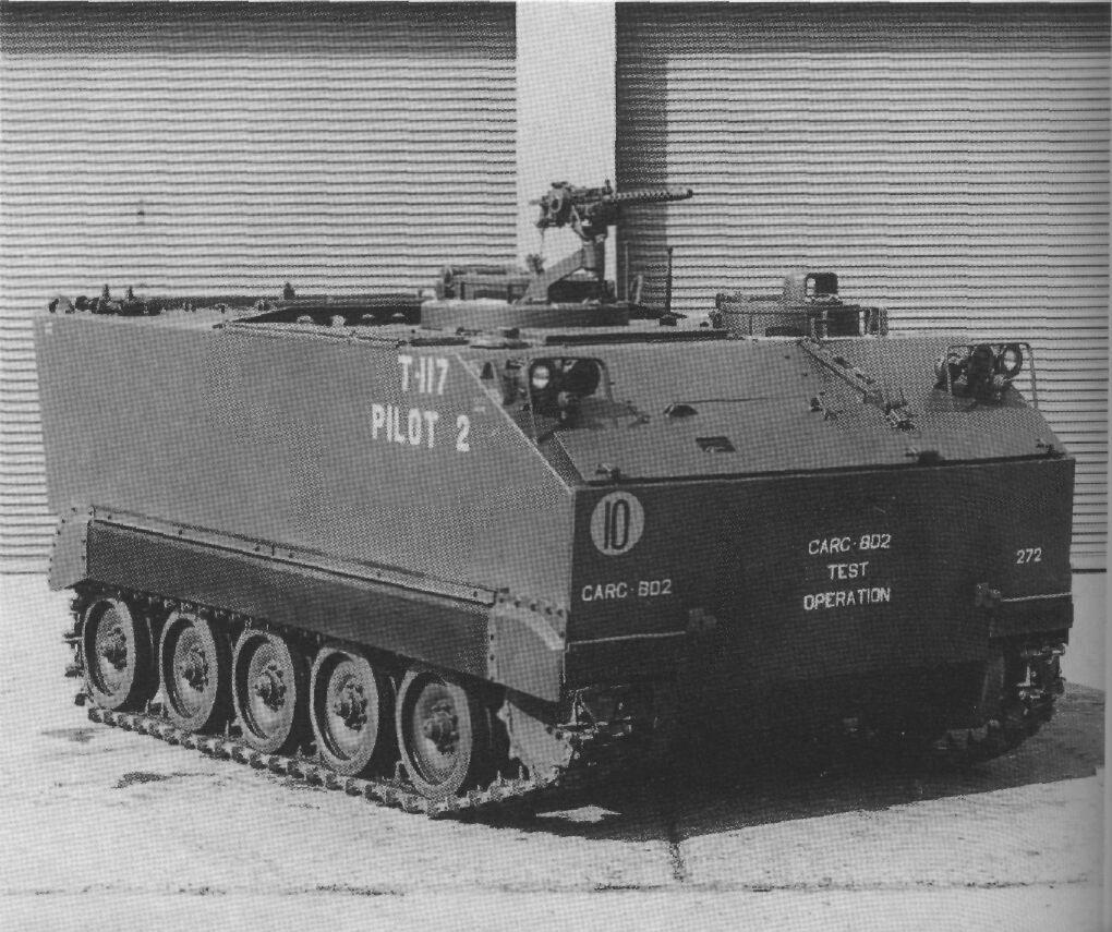 T117, steel-hulled M113 pilot variant